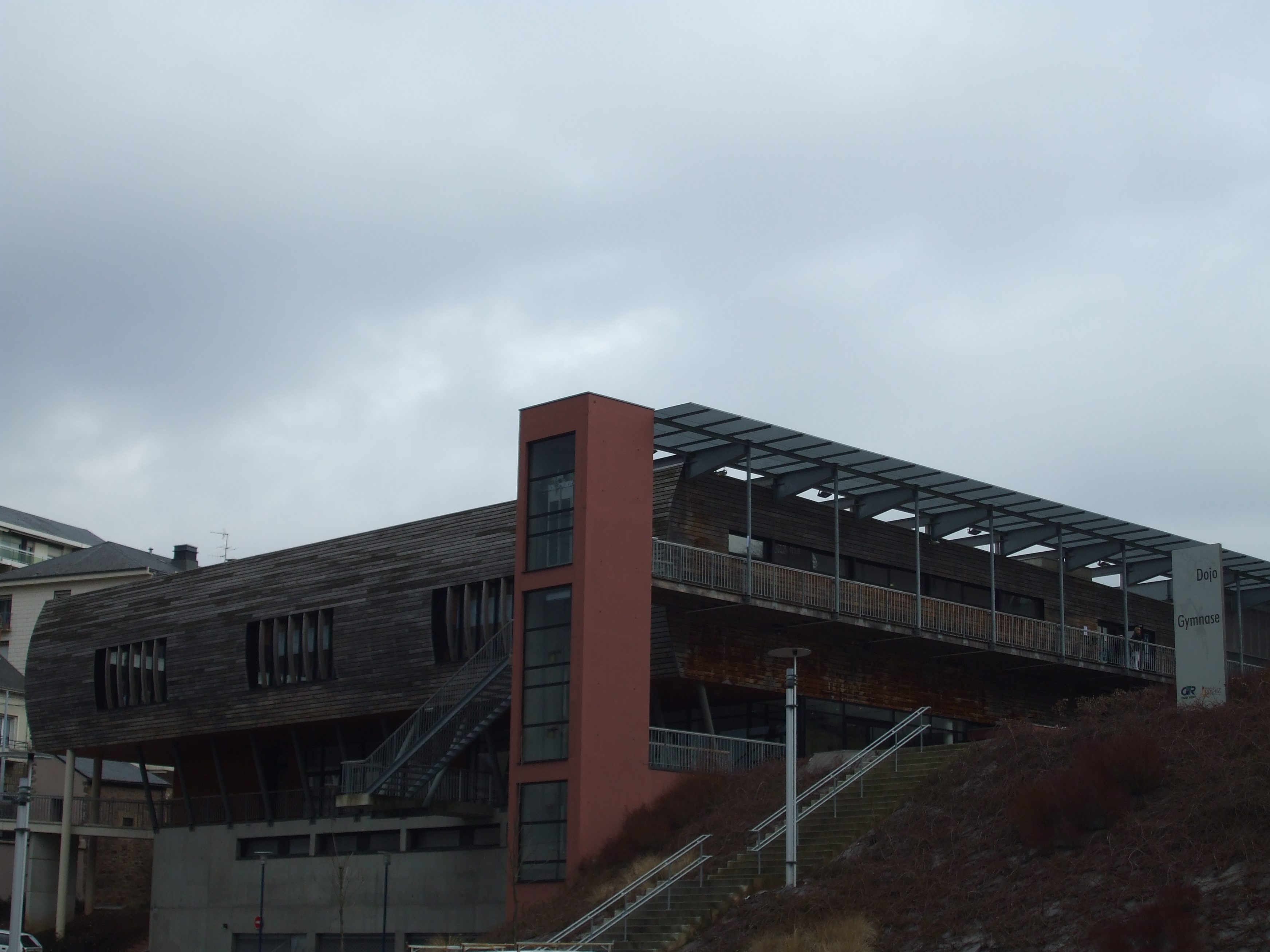 Photo du gymnase Dojo de Rodez.